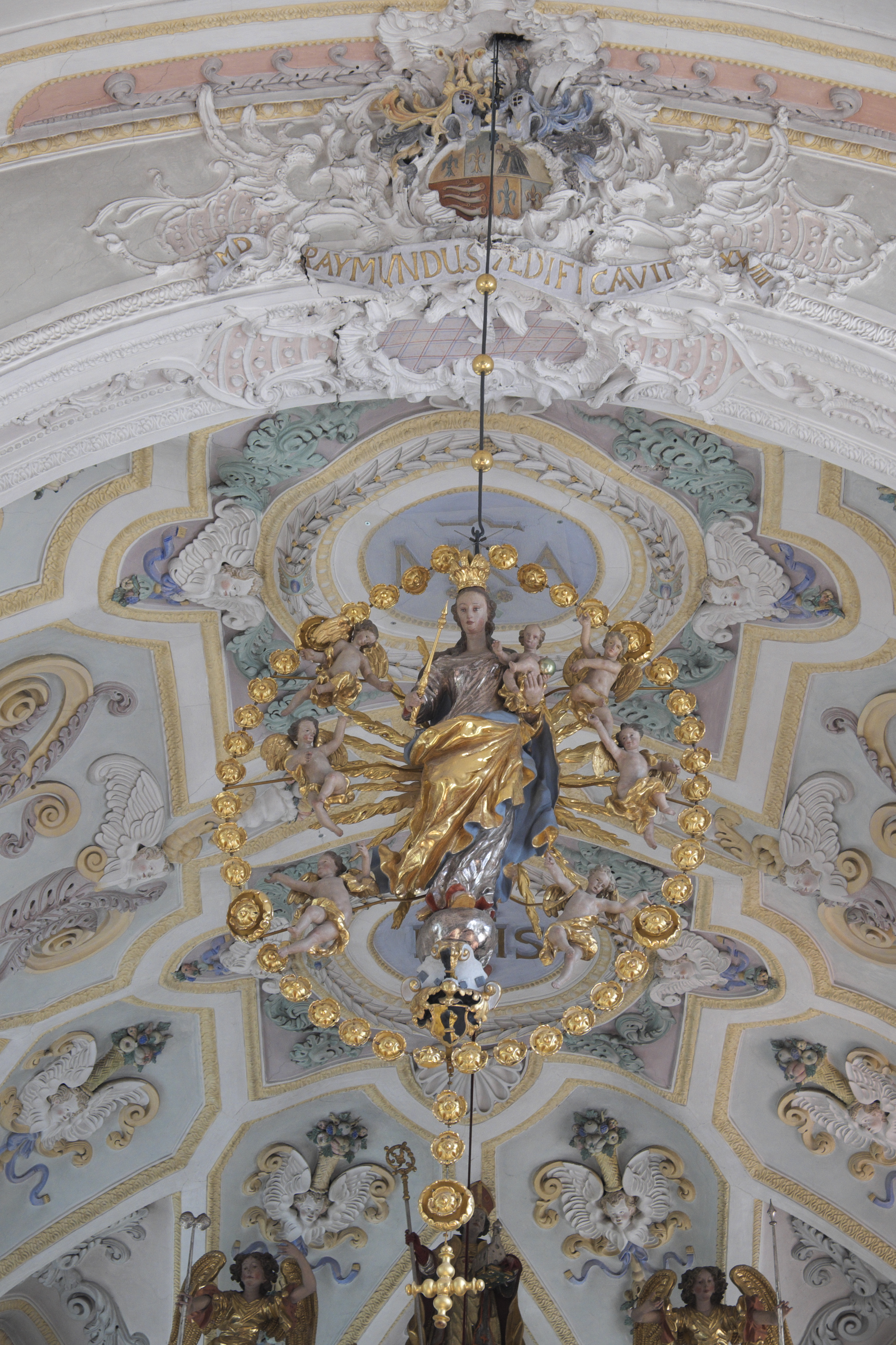 Katholische Pfarrkirche St. Wolfgang in Mickhausen im schwäbischen Landkreis Augsburg (Bayern/Deutschland), Rosenkranzmadonna, spätes 17. Jahrhundert